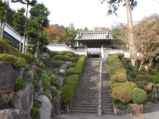 葛山一族の菩提寺、浄土宗仙年寺。その門前。